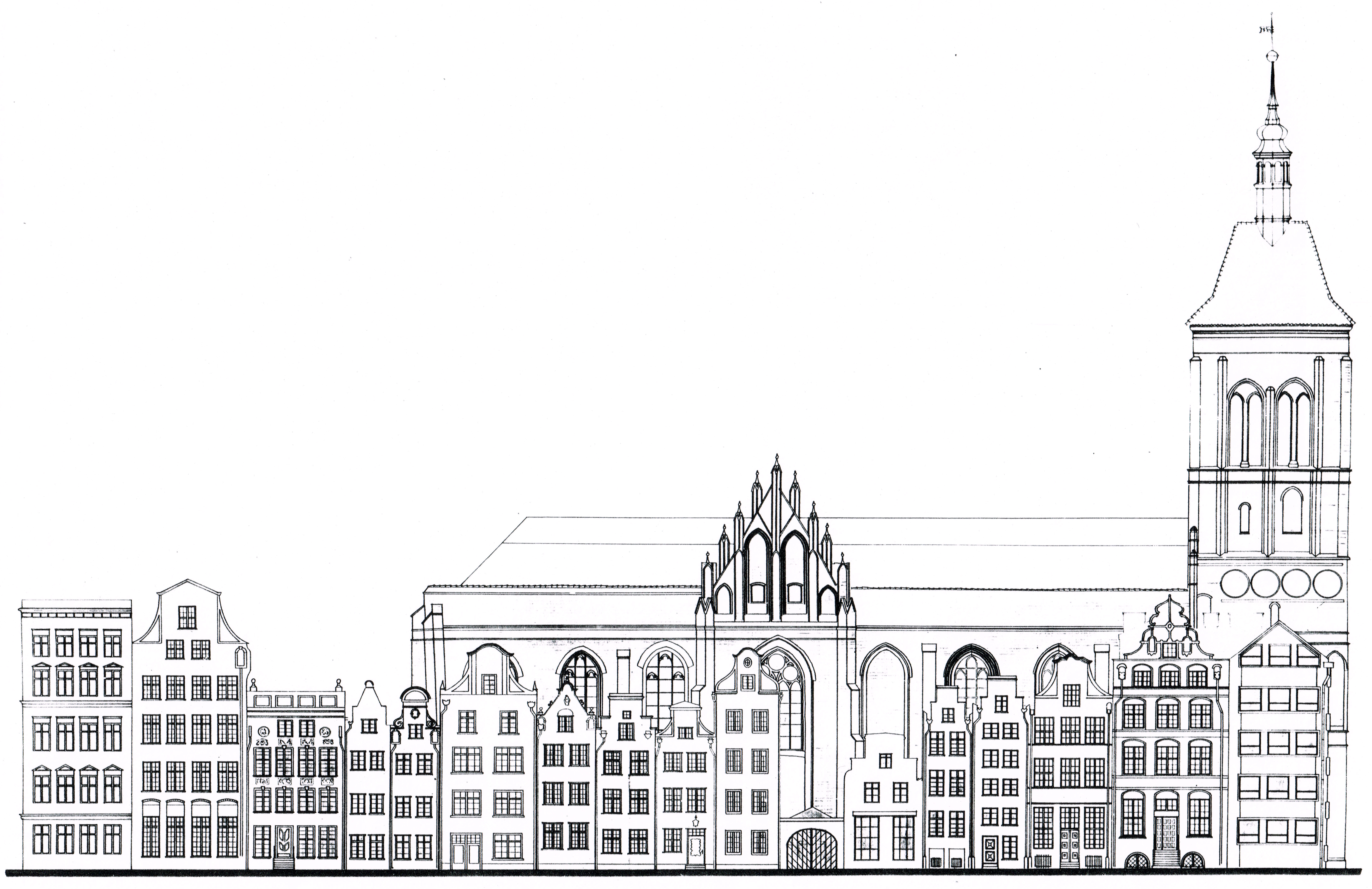 Rysunek z projektu adaptacji kościoła wraz z otoczeniem na Międzynarodowe Centrum Kulturalno-Kongresowe